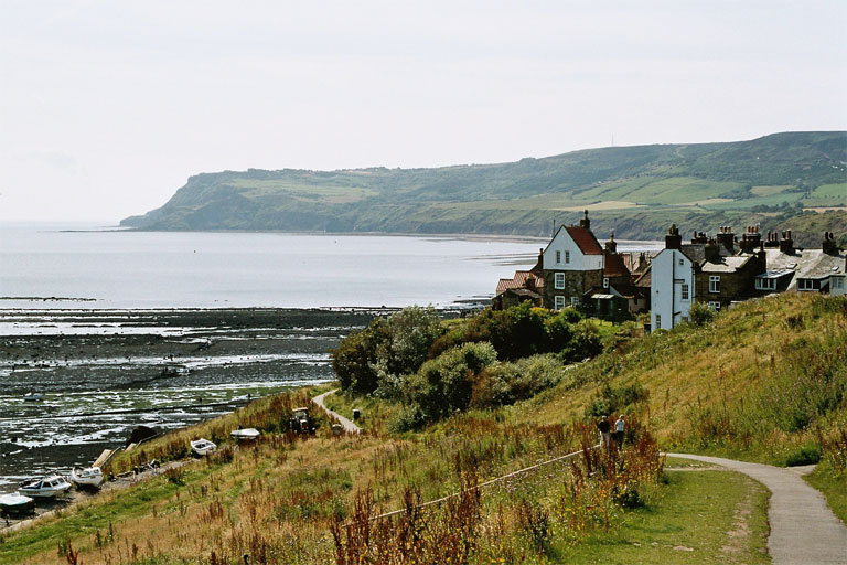 Robin Hood's Bay juli 2004 Foto: AEK